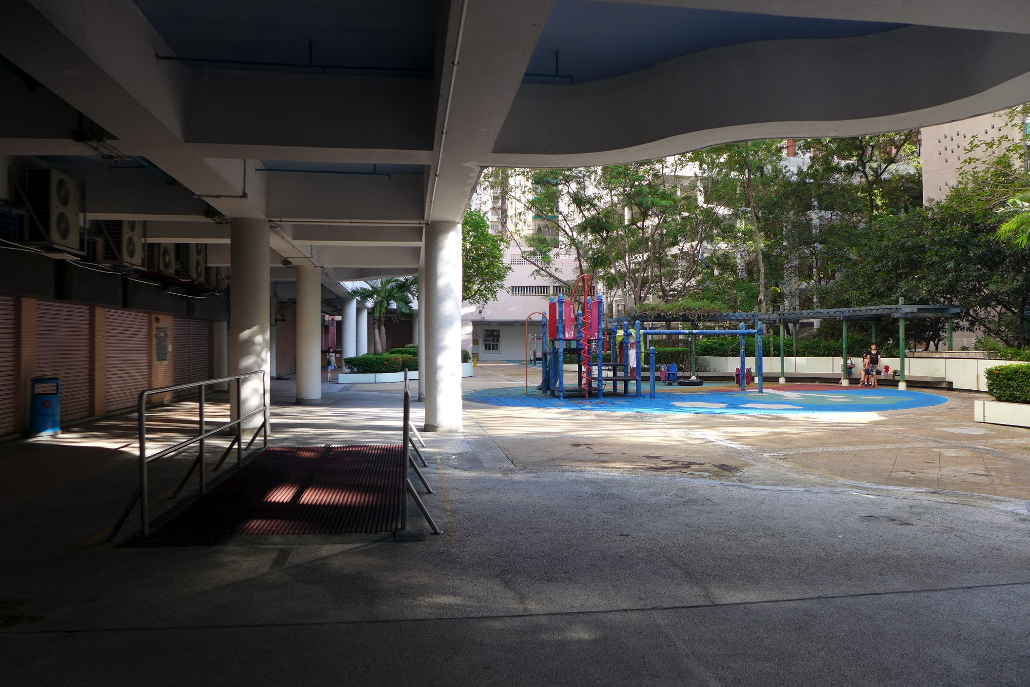 Tsui Ping North Estate Playground